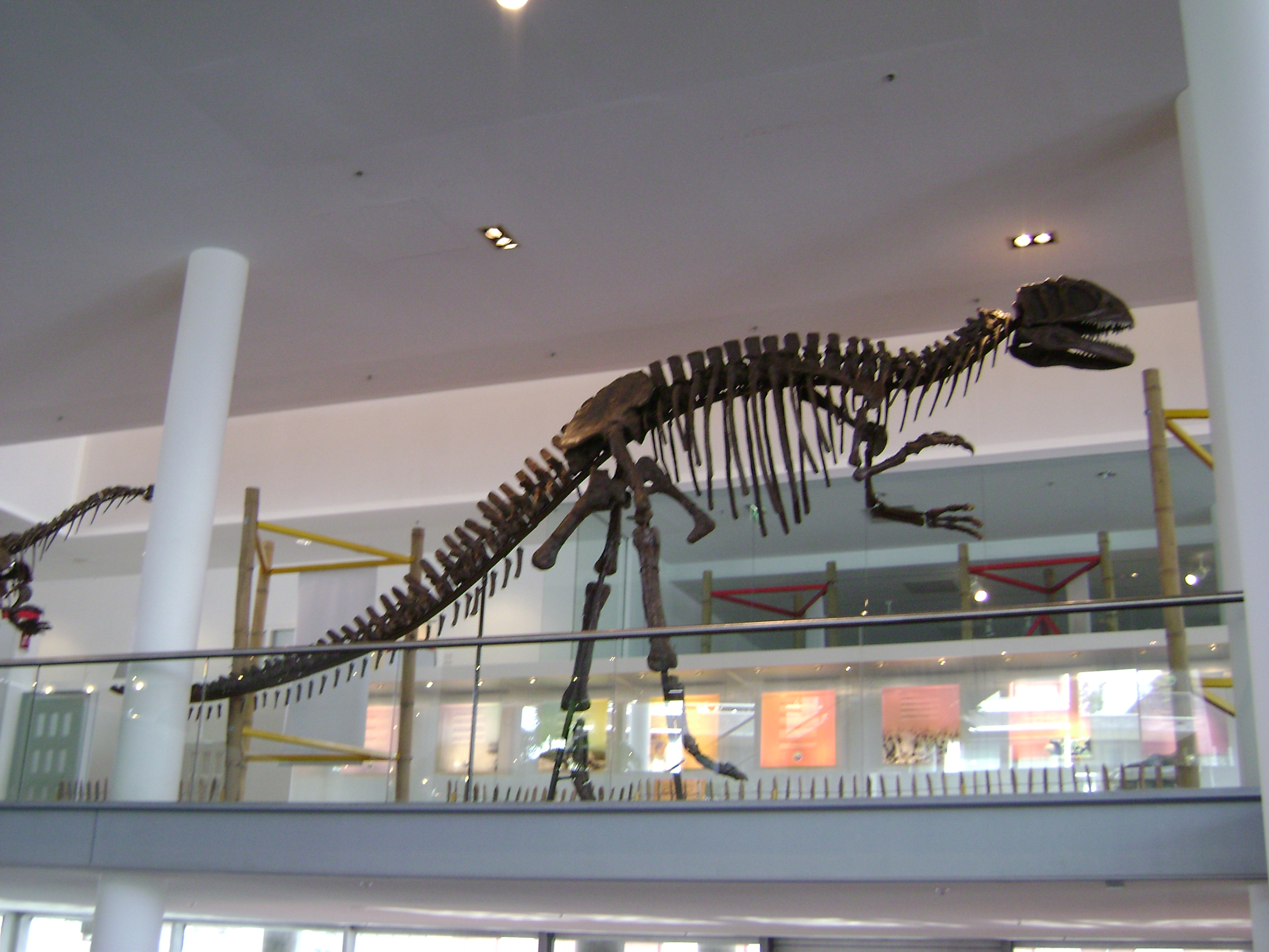 Yangchuanosaurus